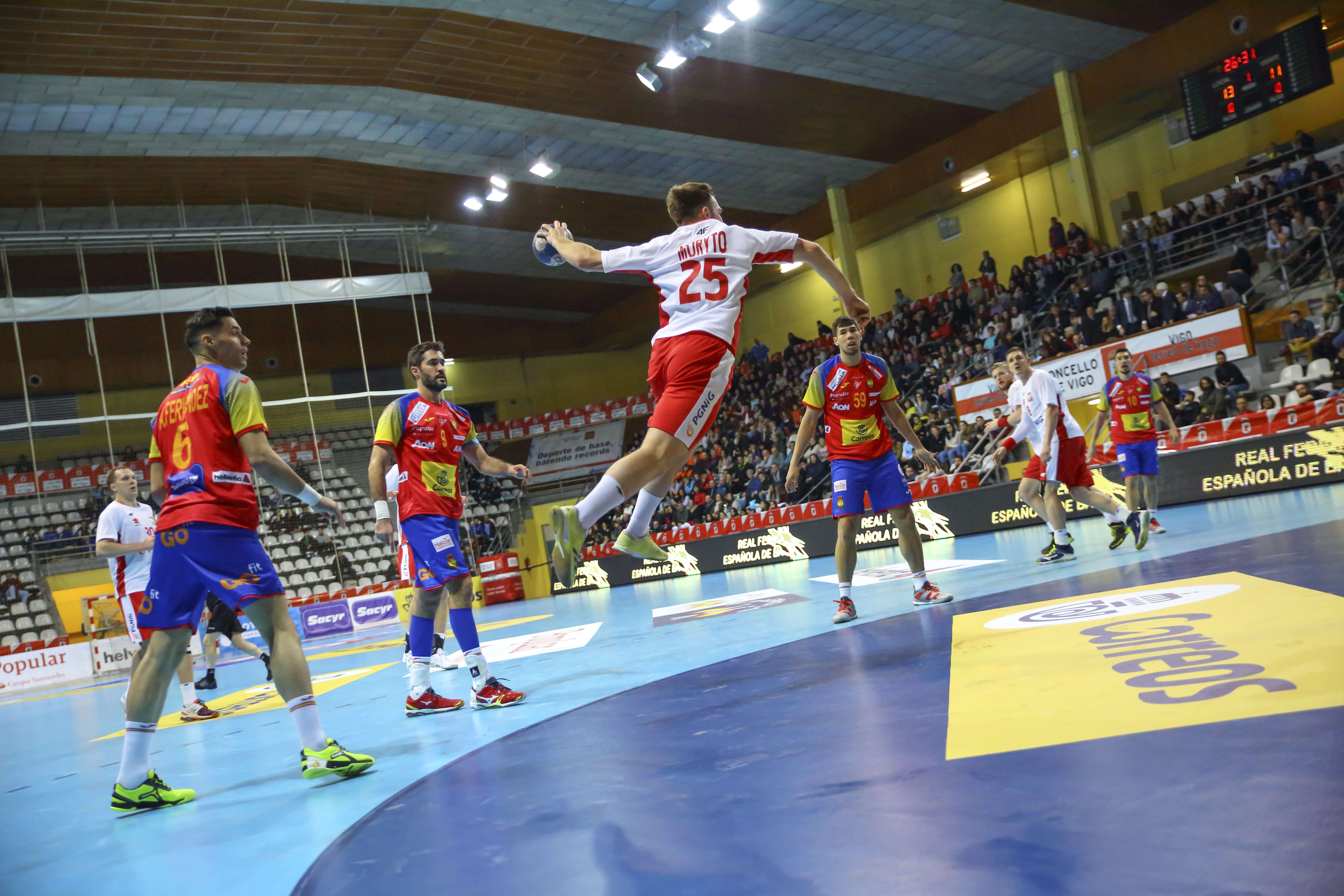 XLIII Torneo Internacional de España, disputado en Pontevedra y Vigo, para el último preparatorio de cara al Europeo, con la convocatorio ya definitiva.